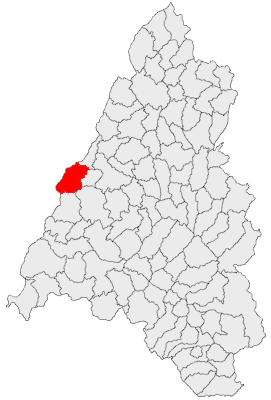 Categorie:Hărţi ale judeţului Bihor